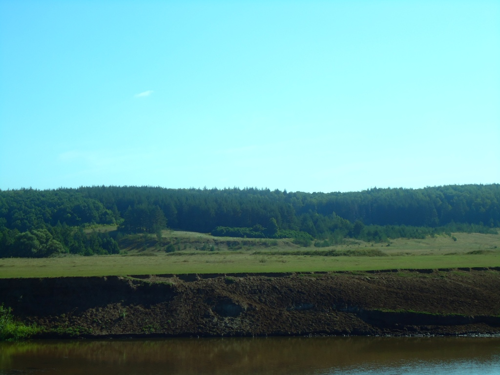 Вид на Тырницу в районе села Строевское